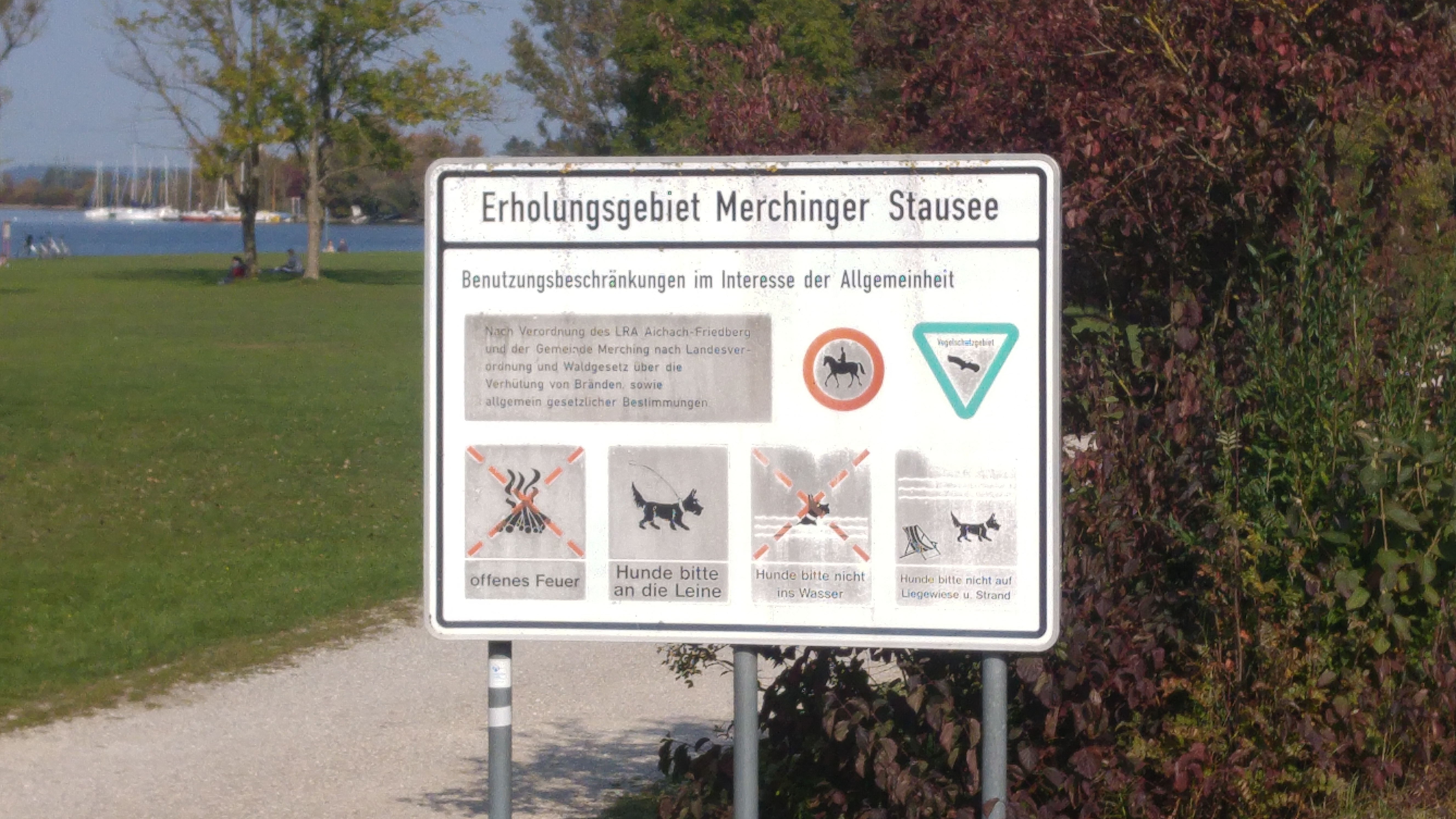 Hier ist das alte Schild Merchinger Stausee.